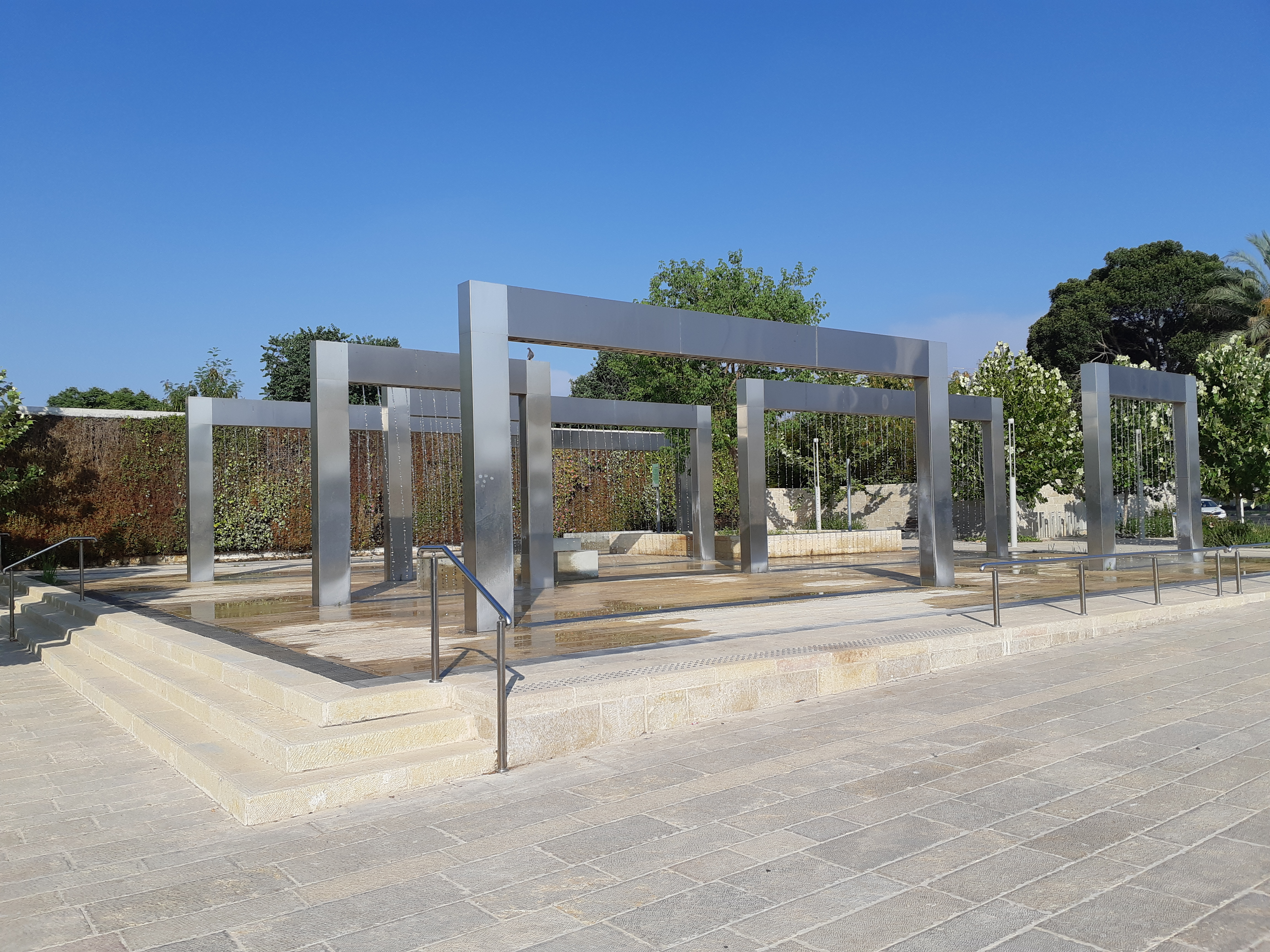 מזרקה בכניסה למודיעין, ברחוב חשמונאים